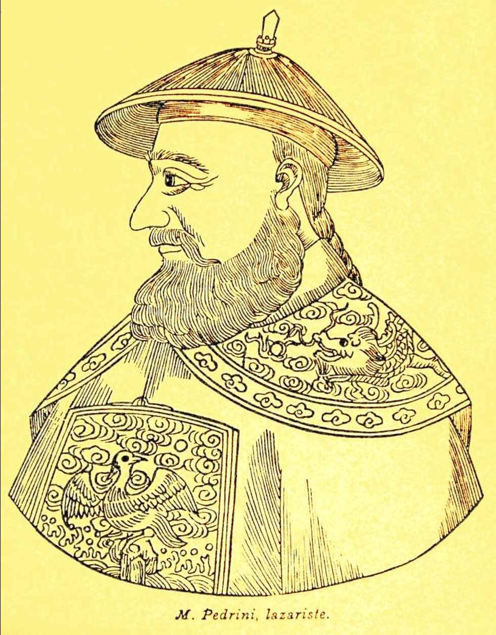 riproduzione del ritratto di Teodorico Pedrini (pubblicato nel 1897) “M(onsieur) Pedrini – lazariste”: in Alphonse Favier, Péking, histoire et description, Péking, Imprimerie des Lazaristes au Pé-T'ang, 1897